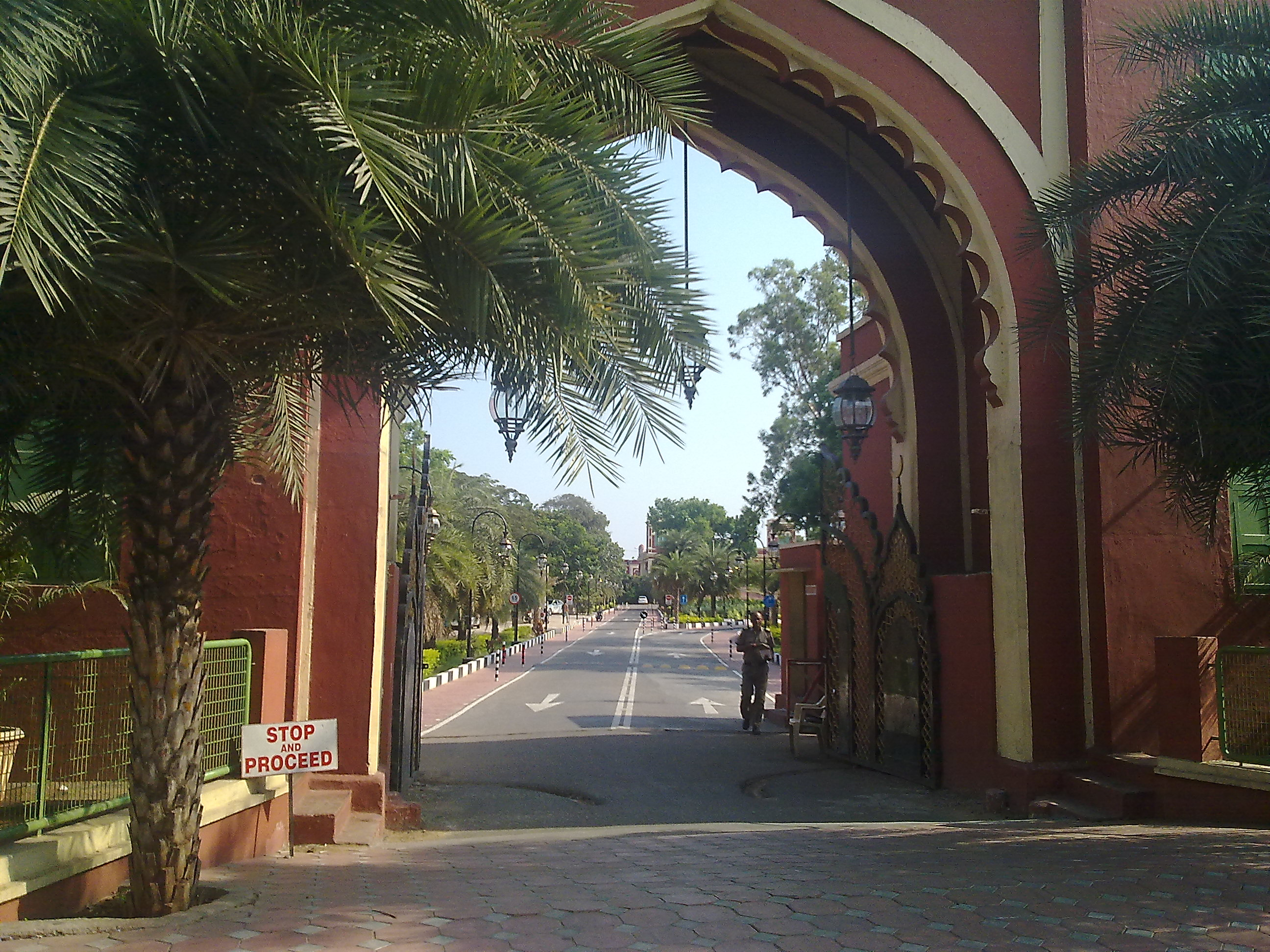 AMIR MAHAL